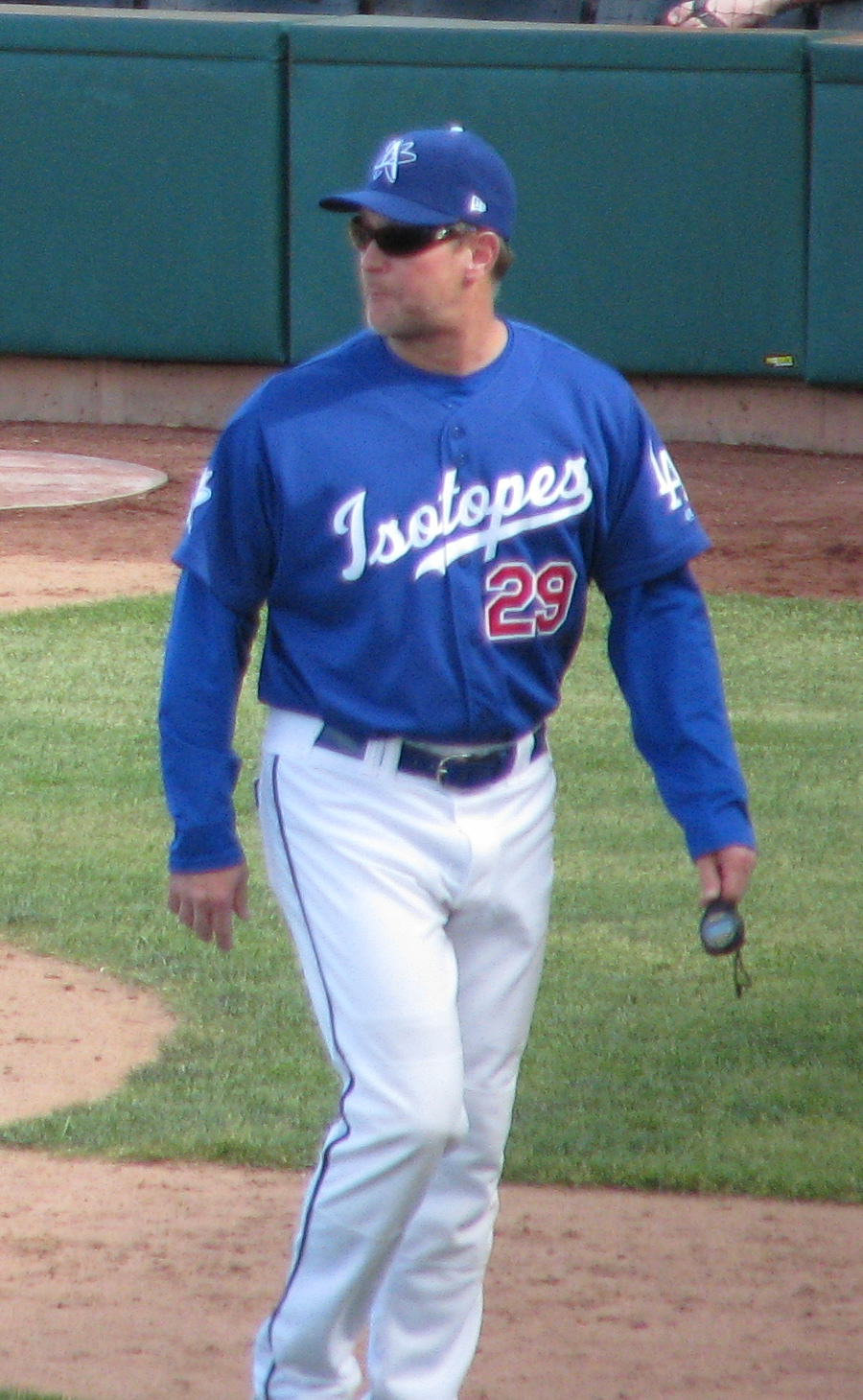 Tim Wallach